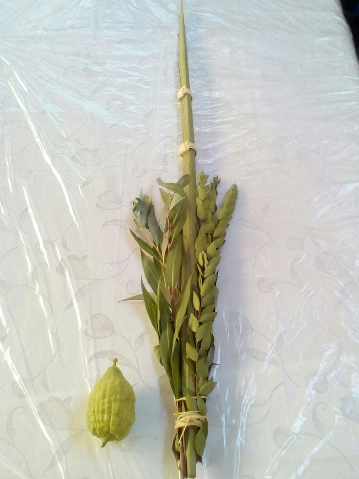 ארבעת המינים: לולב, אתרוג, שלושה הדסים ושתי ערבות.